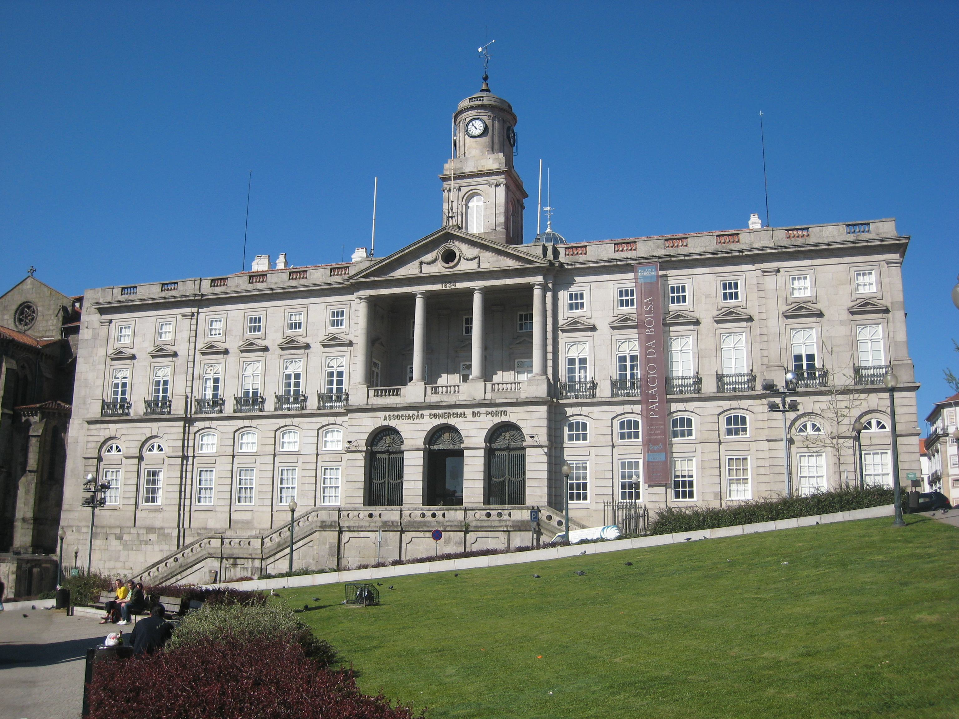 Palácio da Bolsa, Porto, Portugal.